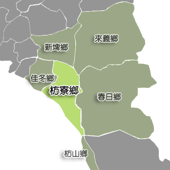 屏東縣枋寮鄉相對位置。